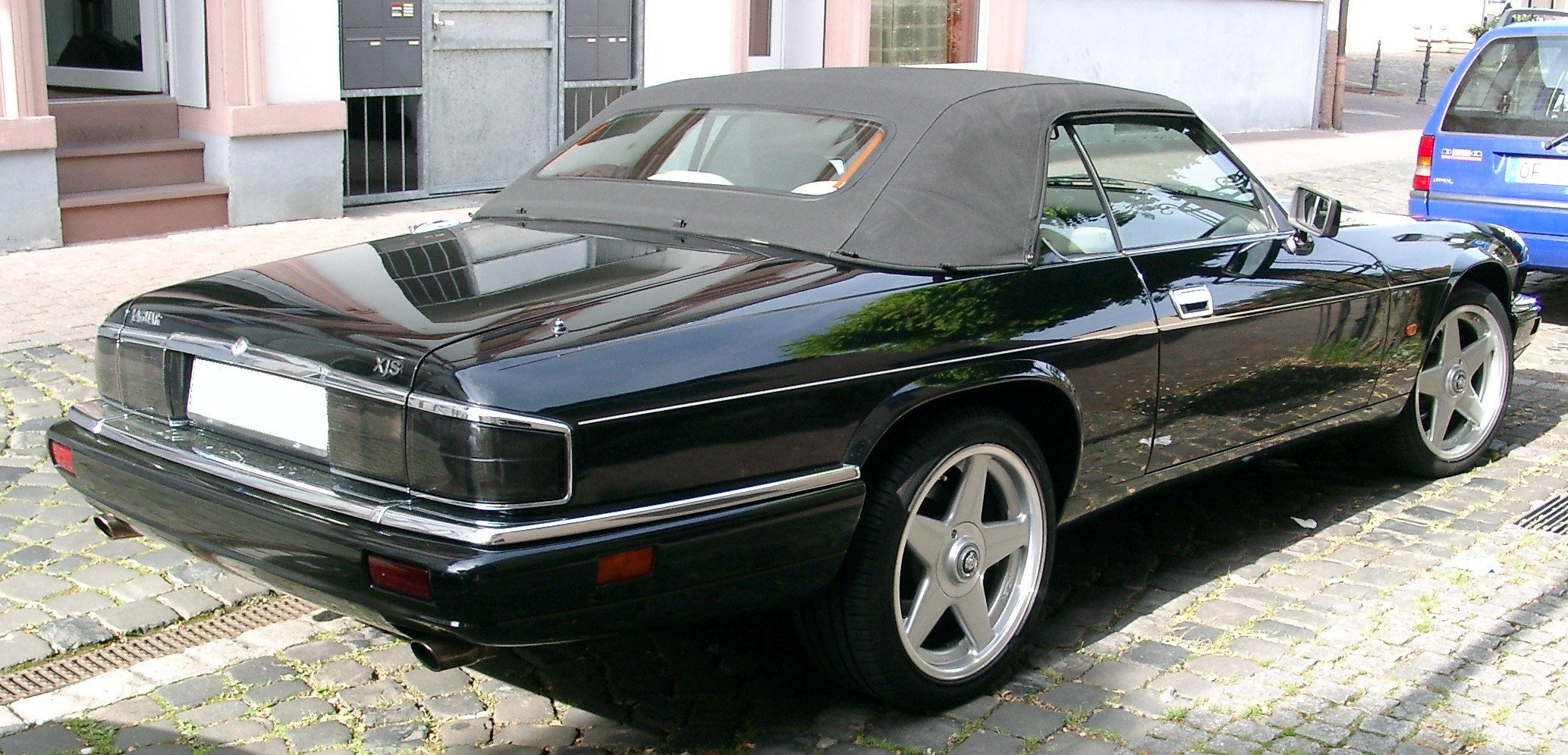 Jaguar XJS Cabriolet